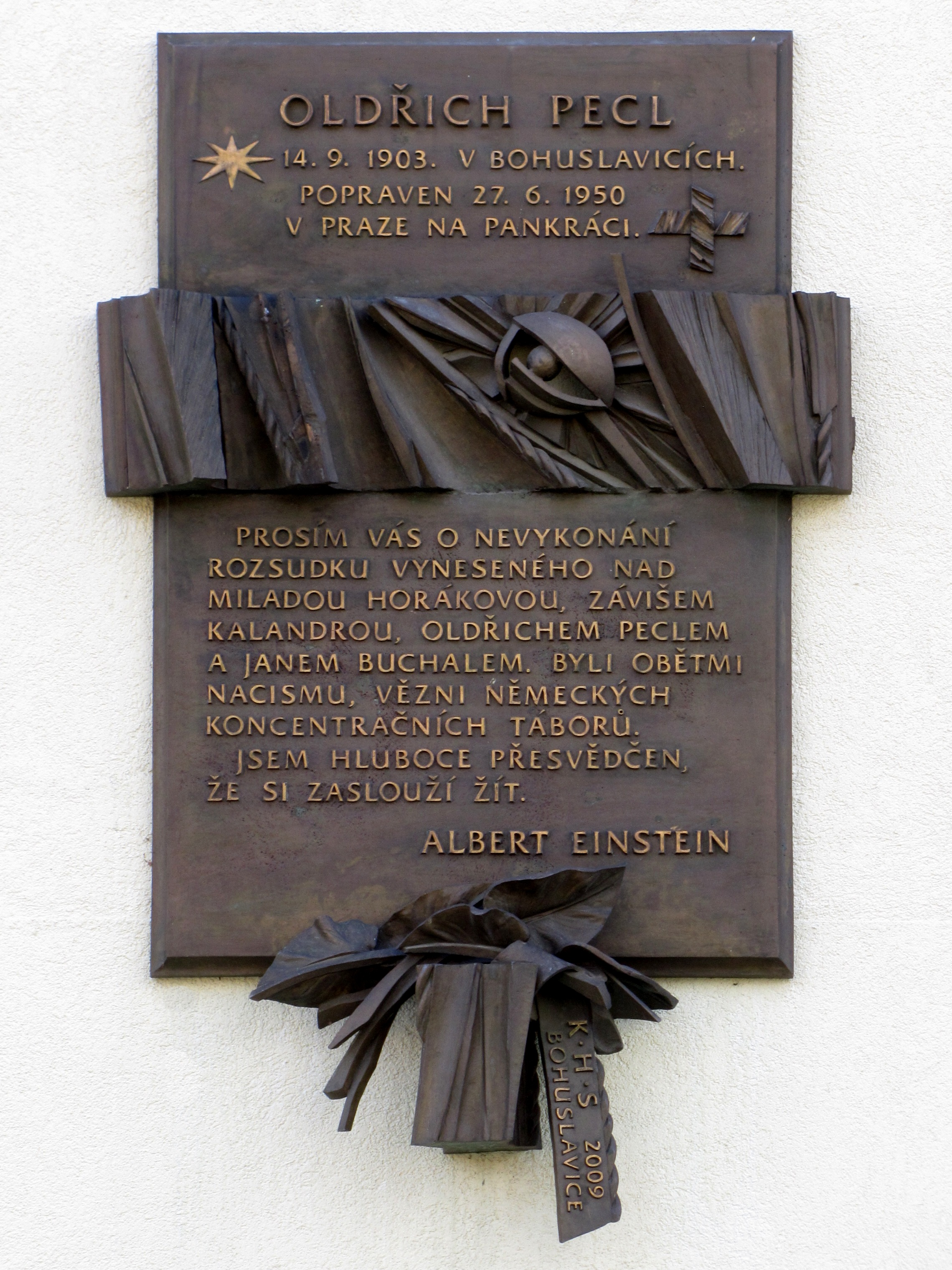 Pamětní deska na základní škole v Kyjově - Bohuslavicích s textem: 14. 9. 1903 v Bohuslavicích, popraven 27. 6. 1950 v Praze na Pankráci. Prosím vám o nevykonání rozsudku vyneseného nad Miladou Horákovou, Závišem Kalandrou, Oldřichem Peclem a Janem Buchalem. Byli obětmi nacismu, vězni německých koncentračních táborů. Jsem hluboce přesvědčen, že si zaslouží žít. Alber Einstein Deska byla odhalena 27. června 2009 Kulturně-historickou společností Bohuslavice a jejím autorem je akademický sochař Otmar Oliva (*1952). Text na desce cituje telegram Alberta Einsteina, který obdržel premiér Antonín Zápotocký 13. 6. 1950.